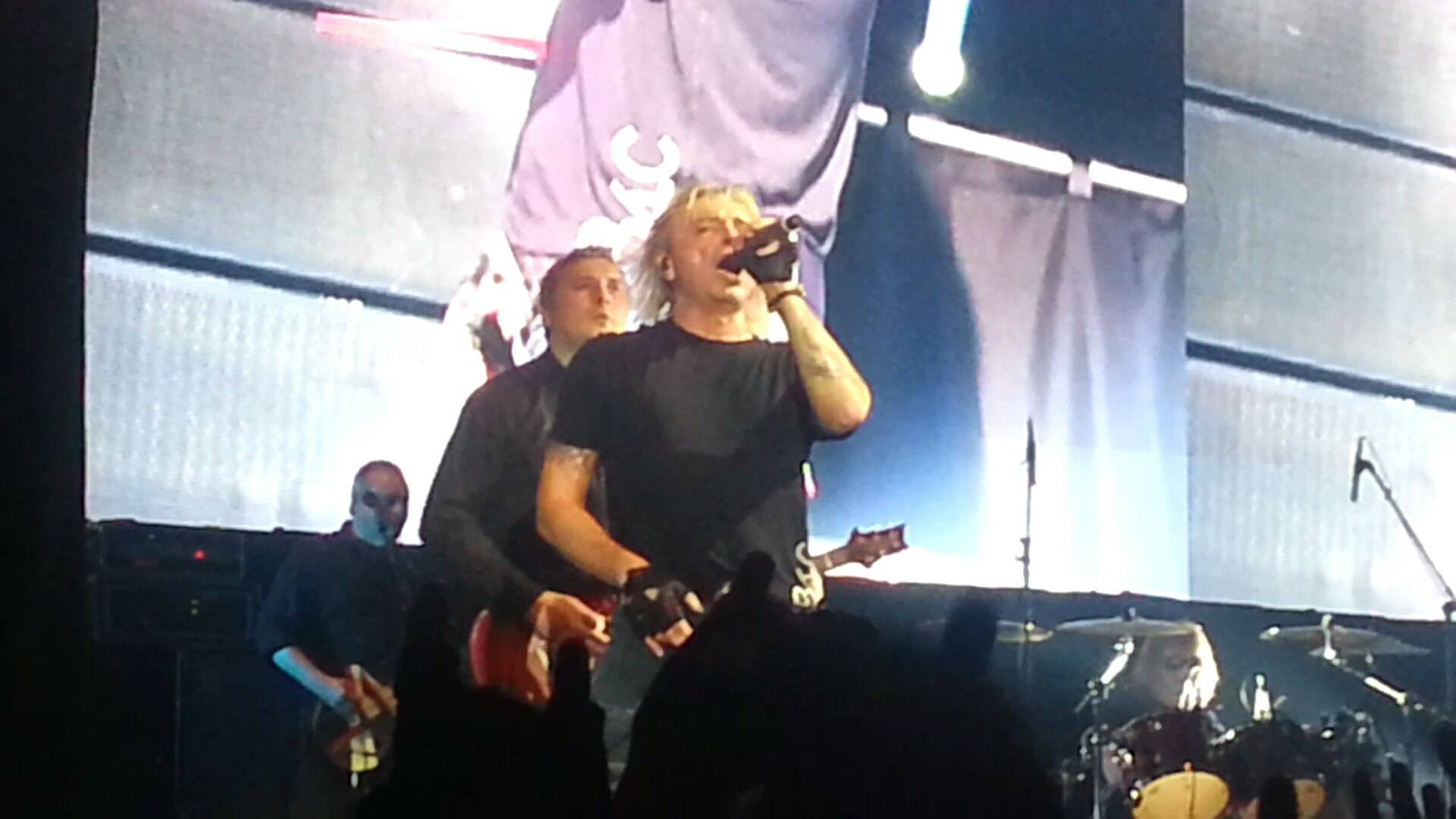 Группа "Алиса" в Москве во время тура в честь тридцатилетия группы.